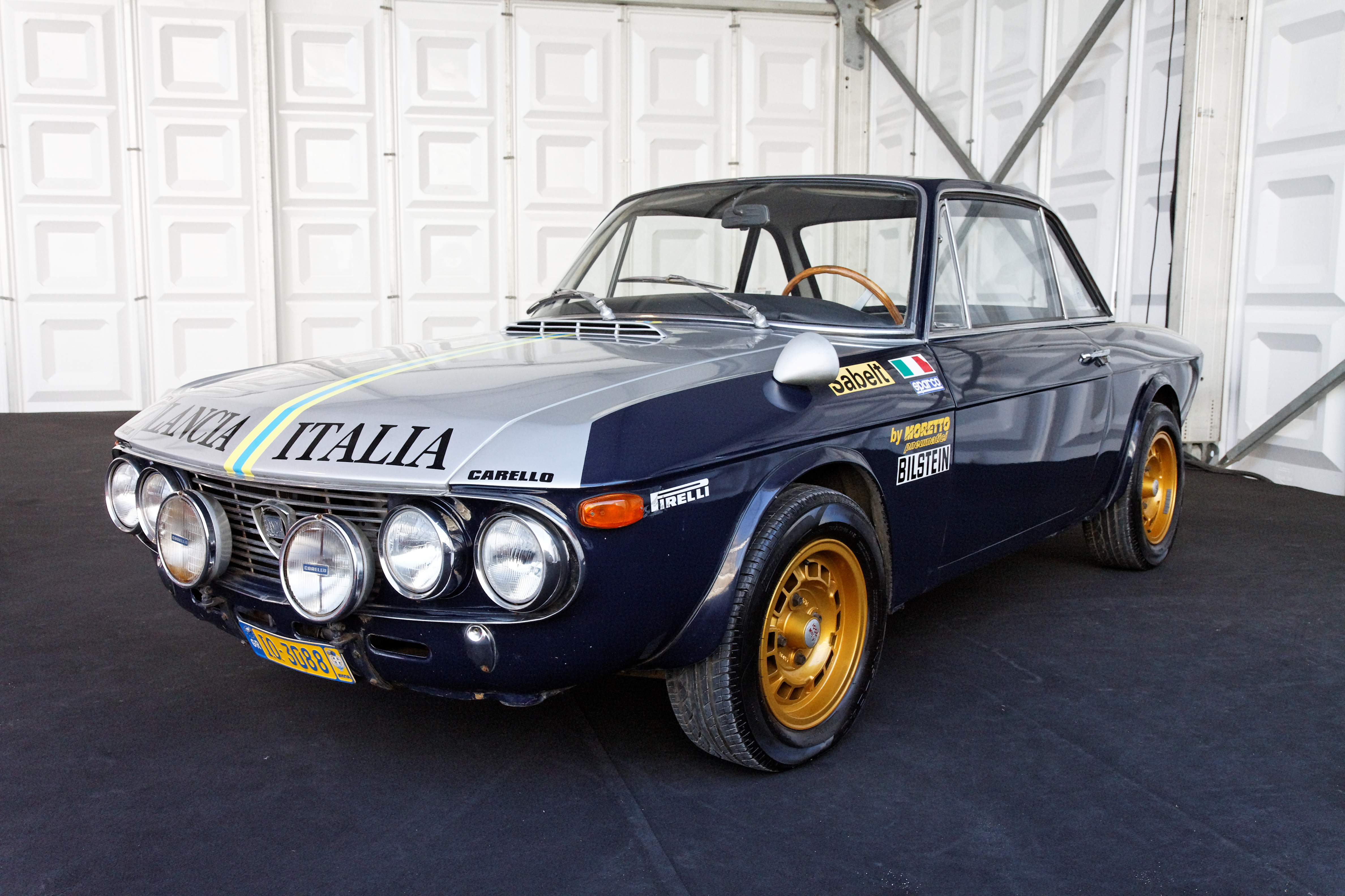 Fulvia Coupé - Festival Automobile International 2011 - Vente aux enchères